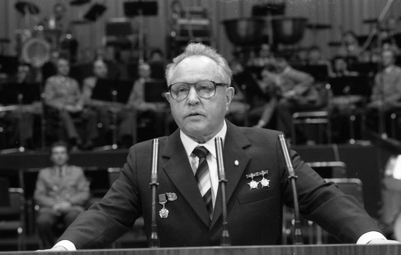 Festveranstaltung SV Dynamo, Erich Mielke ADN-ZB/Franke 25.3.83 Berlin: Festveranstaltung In einer Festansprache würdigte der 1. Vorsitzende der SV Dynamo, Armeegeneral Erich Mielke, Mitglied des Politbüros und Sekretär des ZK der SED und Minister für Staatssicherheit, das 30jährige erfolgreiche Wirken der Sportvereinigung.